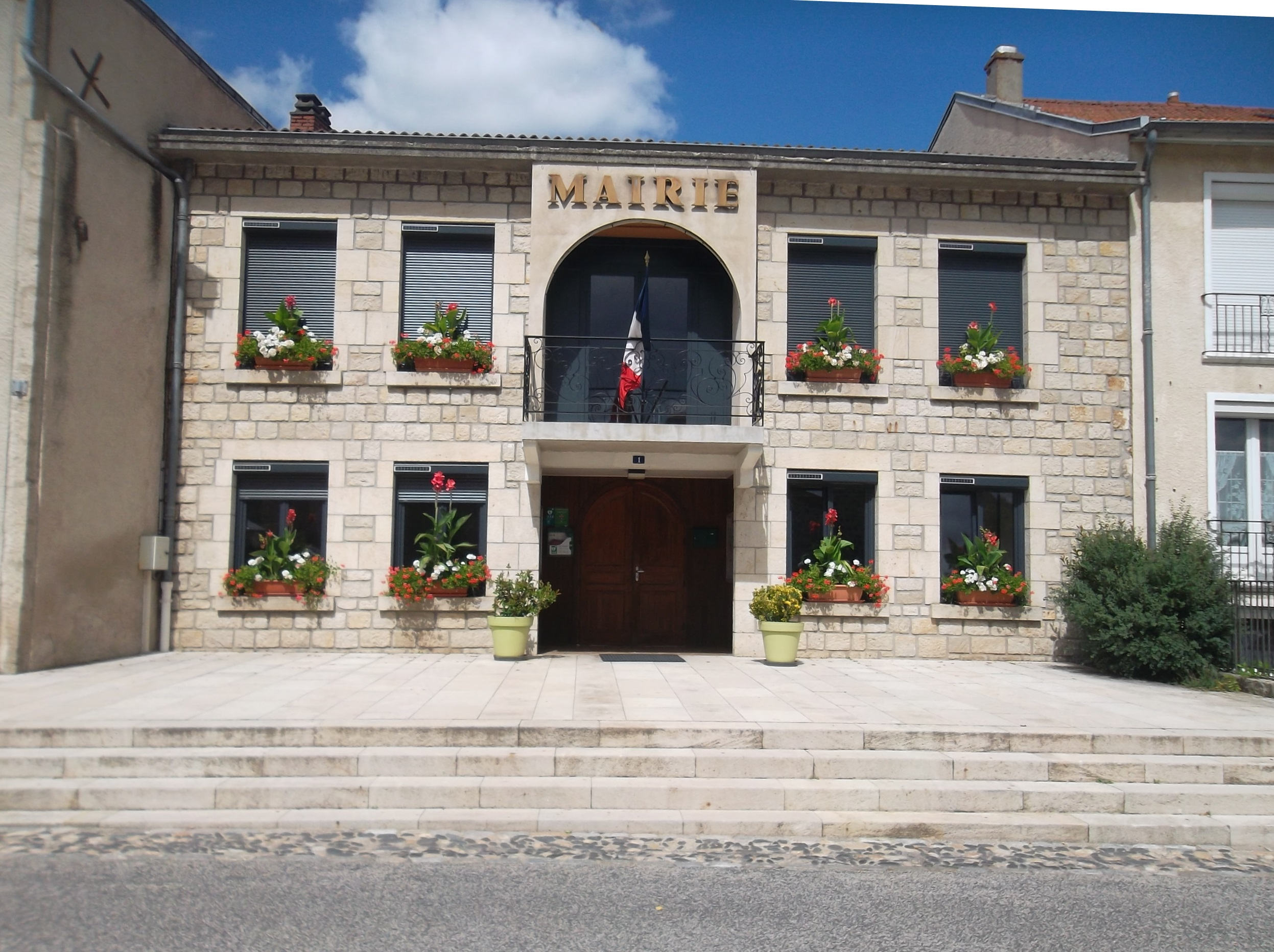 la Mairie